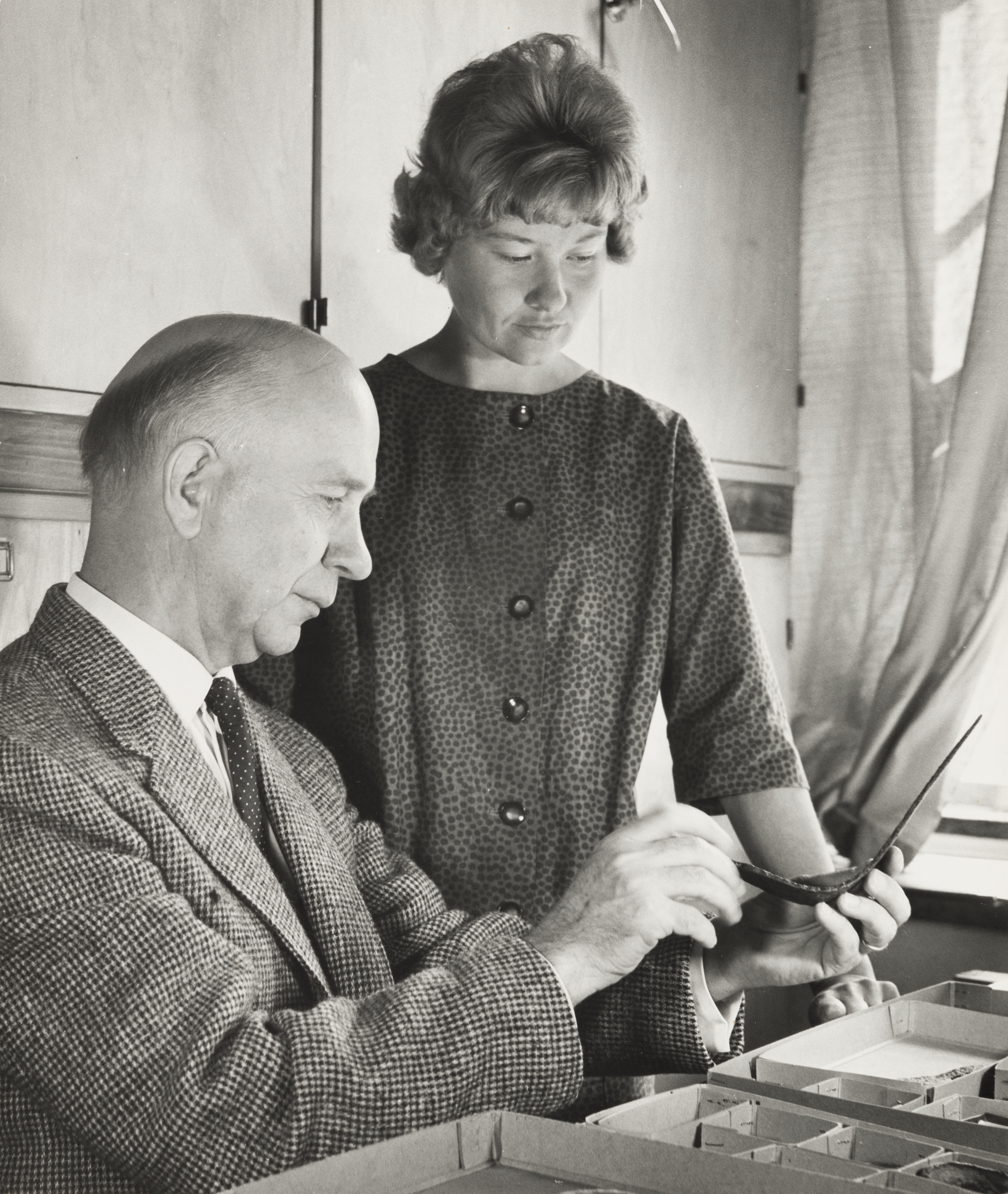 Esihistoriallisen osaston johtaja, tri Helmer Salmo ja Pirkko-Liisa Lehtosalo 1960-luvun lopulla